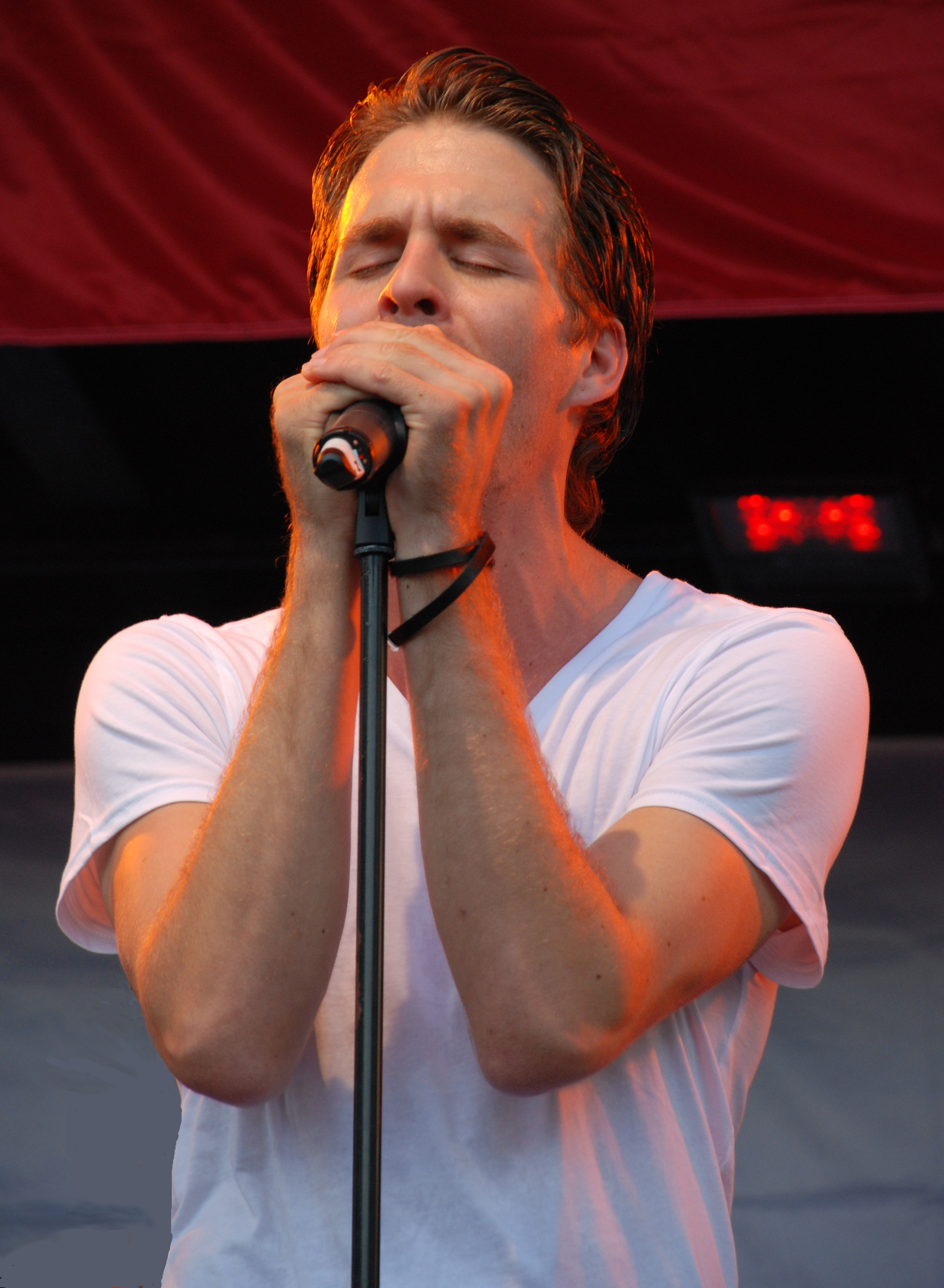 Livekonzert Köln Heumarkt